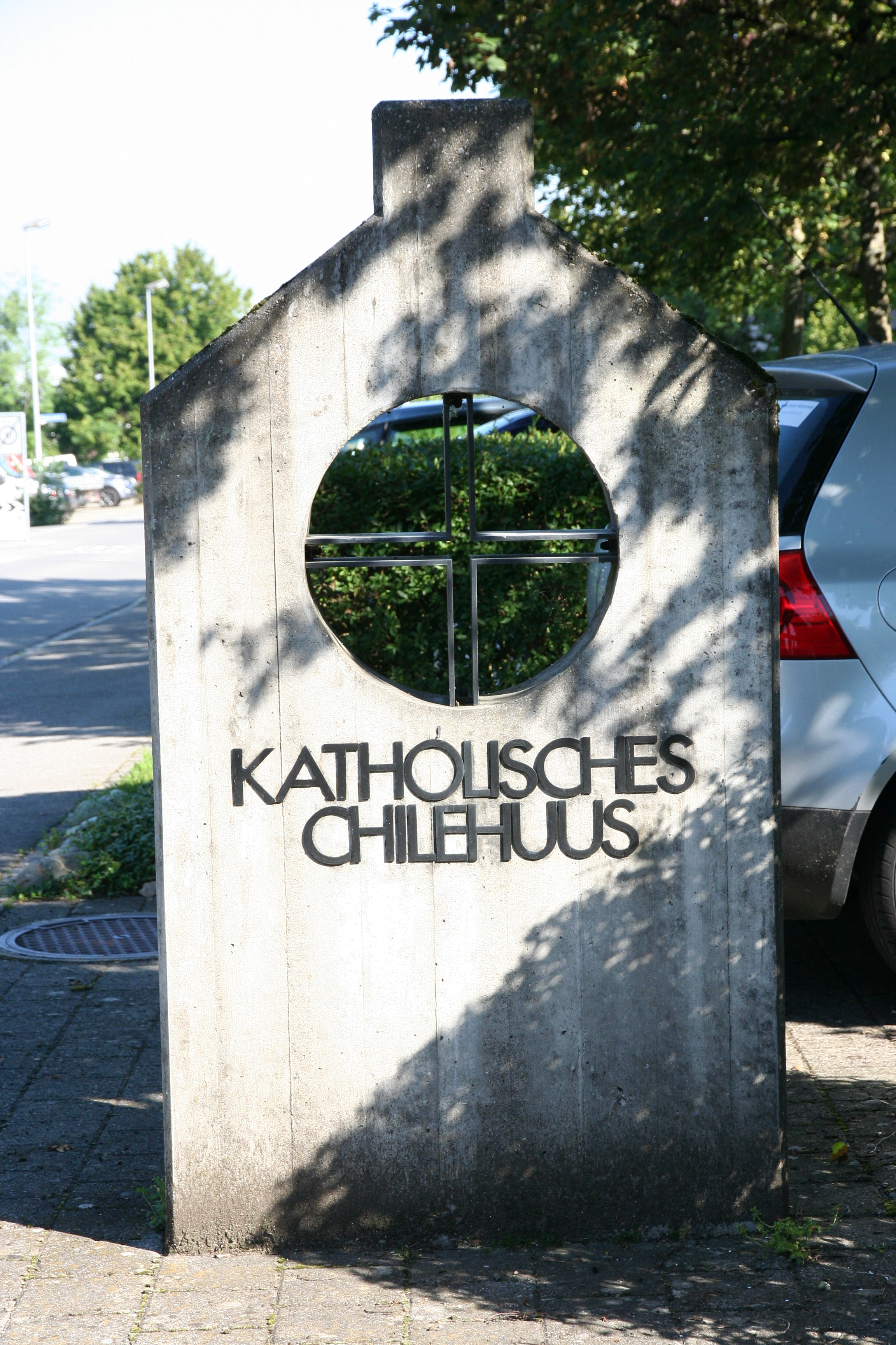 Römisch-katholische Kirche St. Antonius Obfelden, Zugang